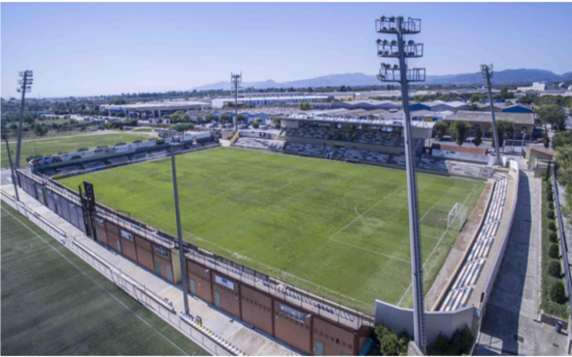 Estadi Municipal de Reus